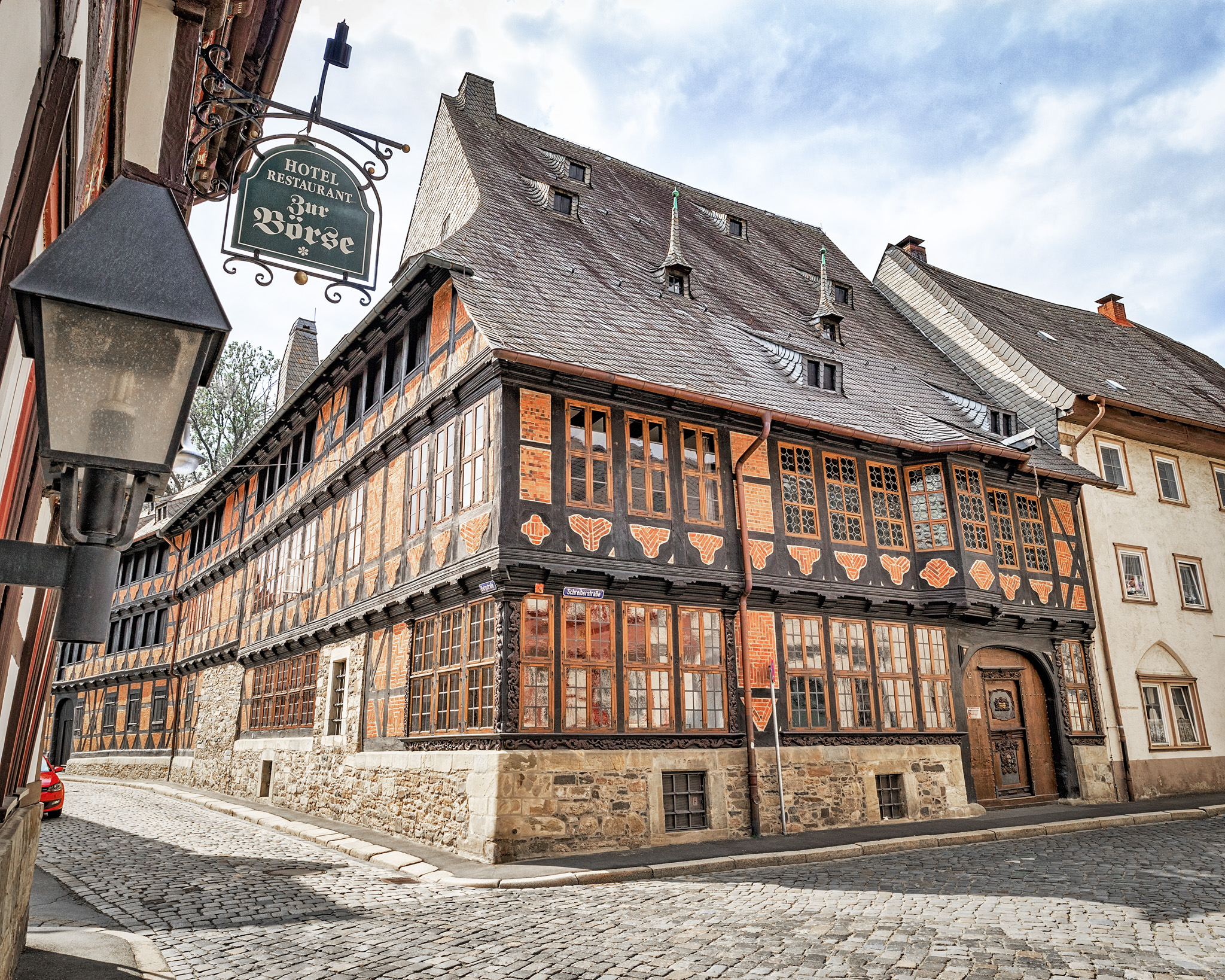 Aussenansicht Siemenshaus